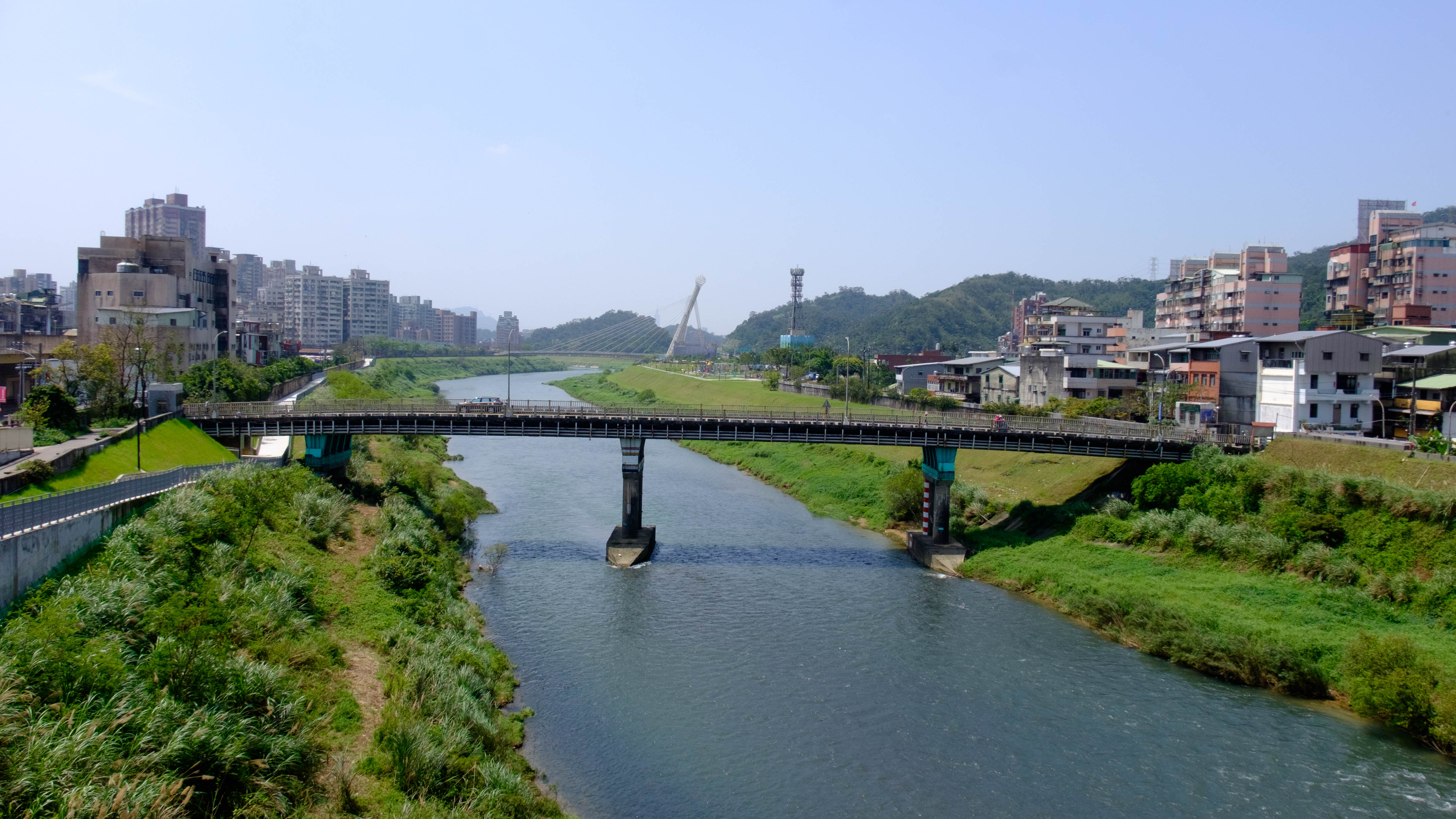 從新北市汐止區新長安橋西側自行車道西向俯望長安橋。